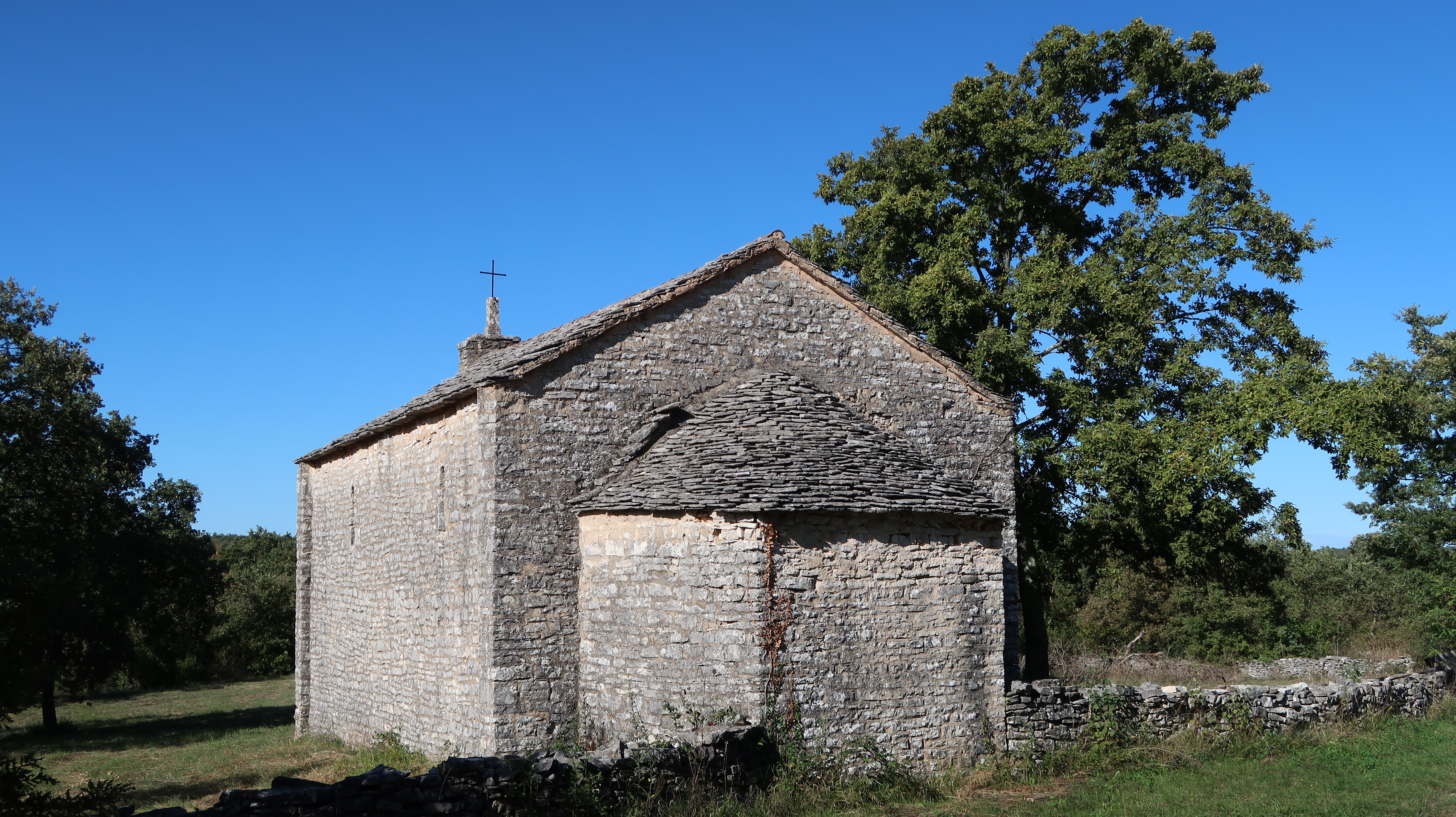 Kroatien (HR) - Gespanschaft Istrien (036) - Gemeinde Kanfanar: Kirche der heiligen Agatha (10. Jahrhundert) an der Straße nach Vidulini